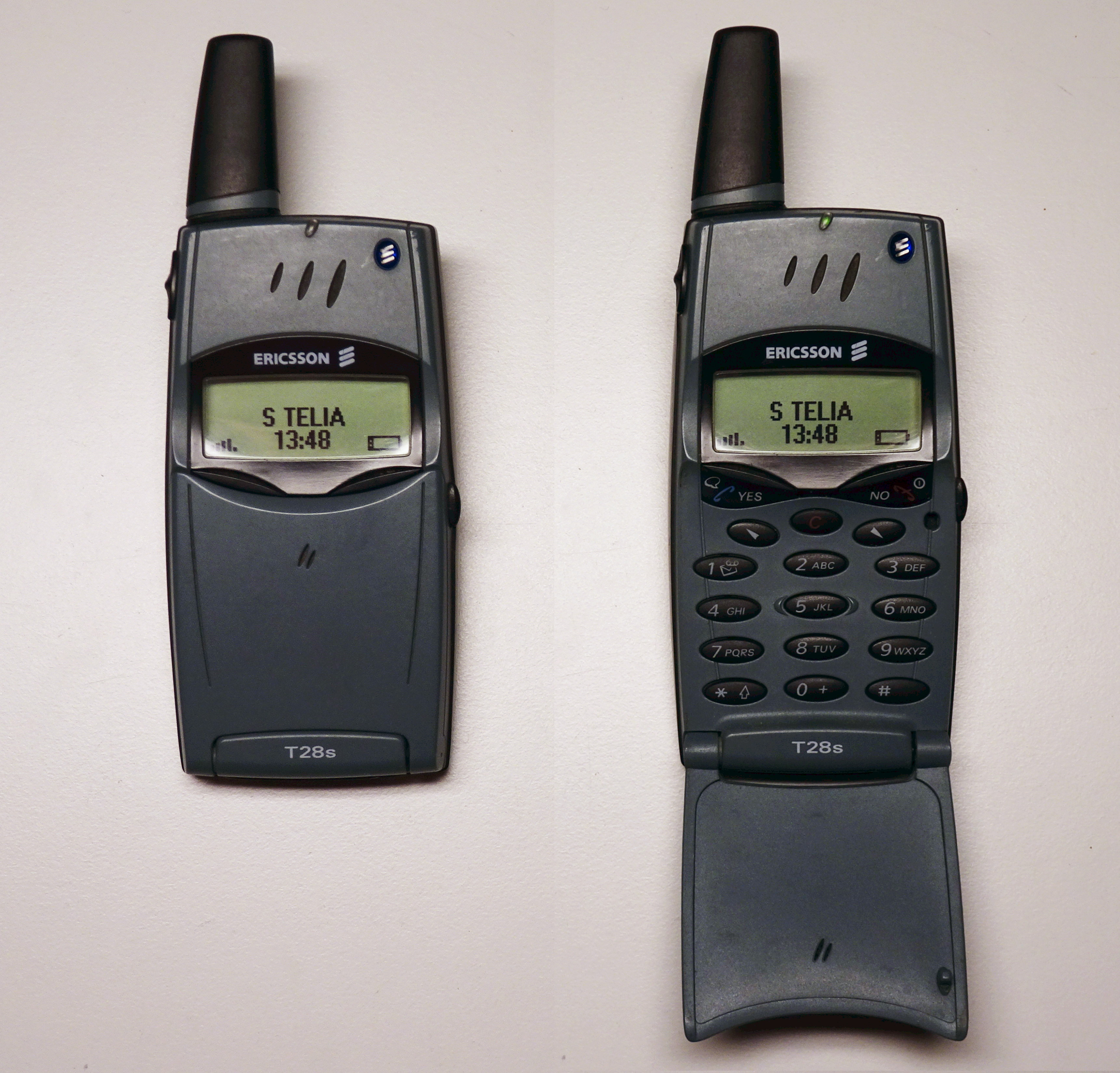 Mobile phone Ericsson T28.